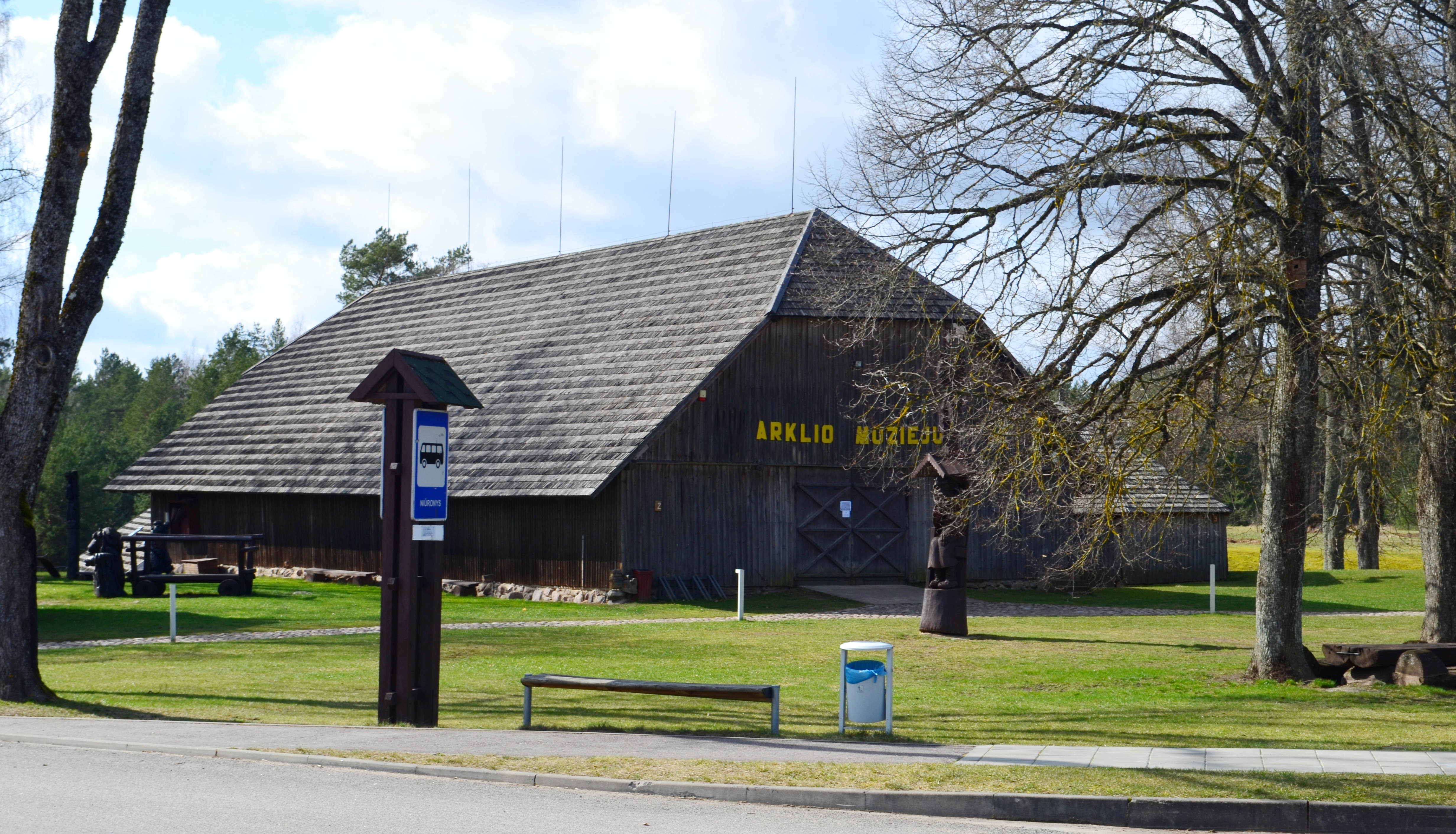 Arklio muziejus, Niūronys, Anykščių raj.